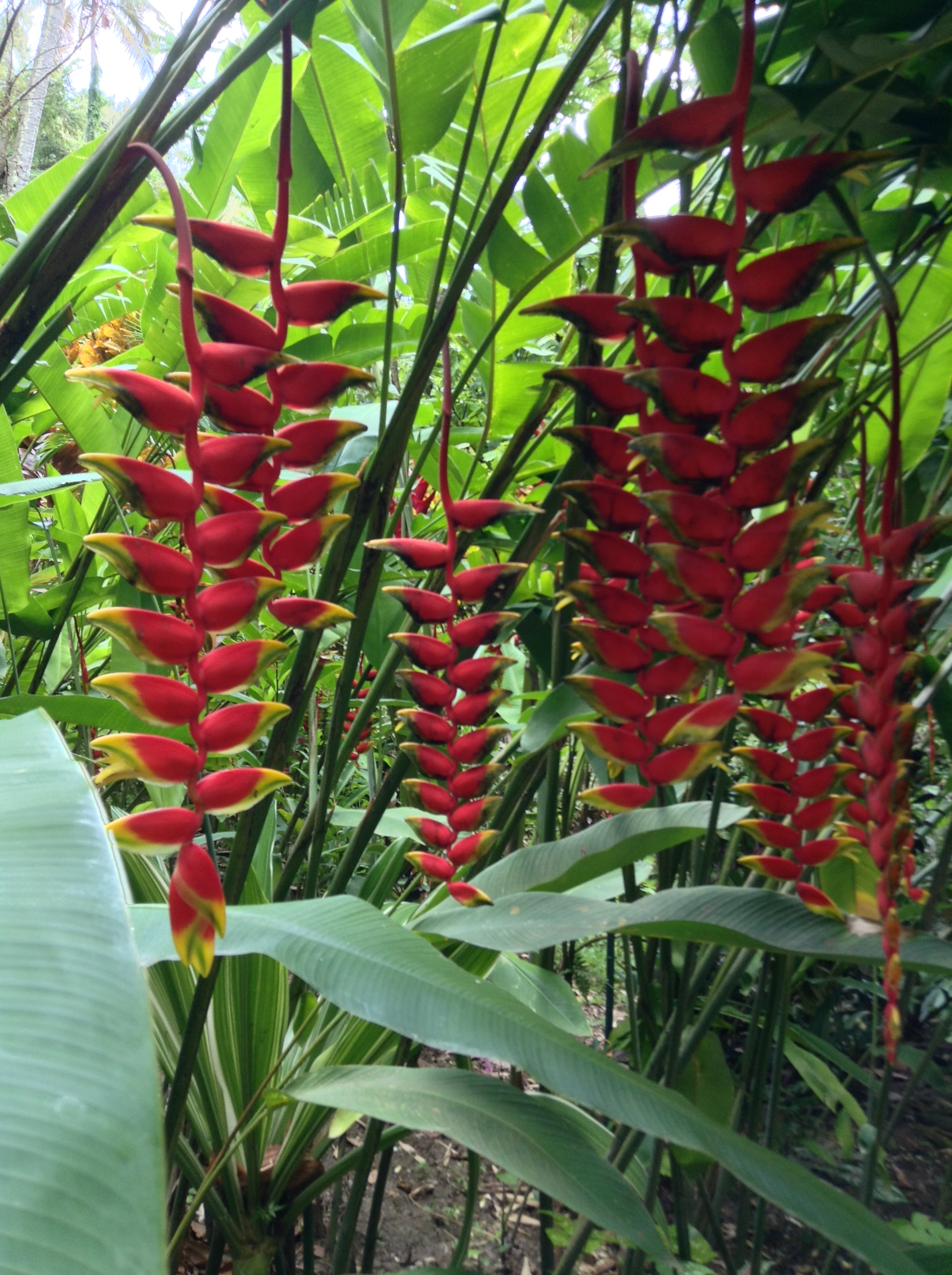 Heliconia rostrata à Ste Lucie